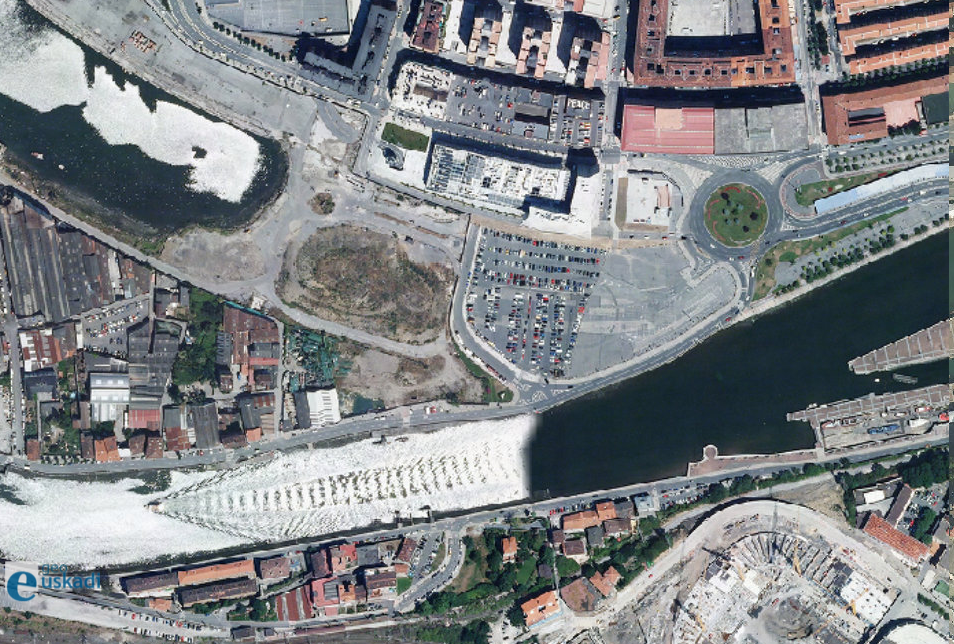 Zorrotzaurreko penintsula lotzen zuen istmoa, 2012an